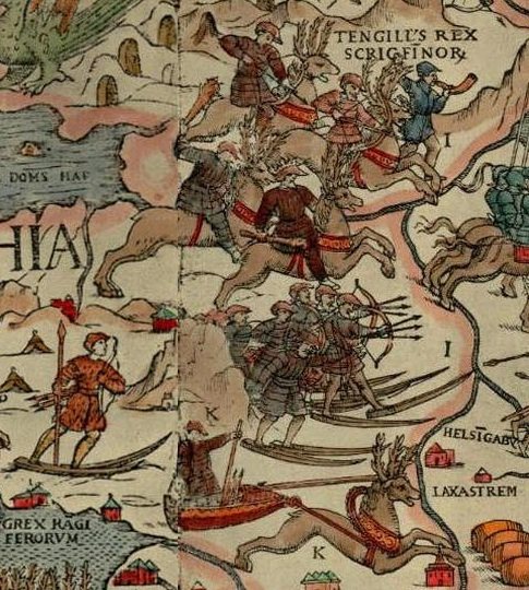 Utsnitt ur Olaus Magnus Carta Marina som visar Scricfinor/Skridfinnar.